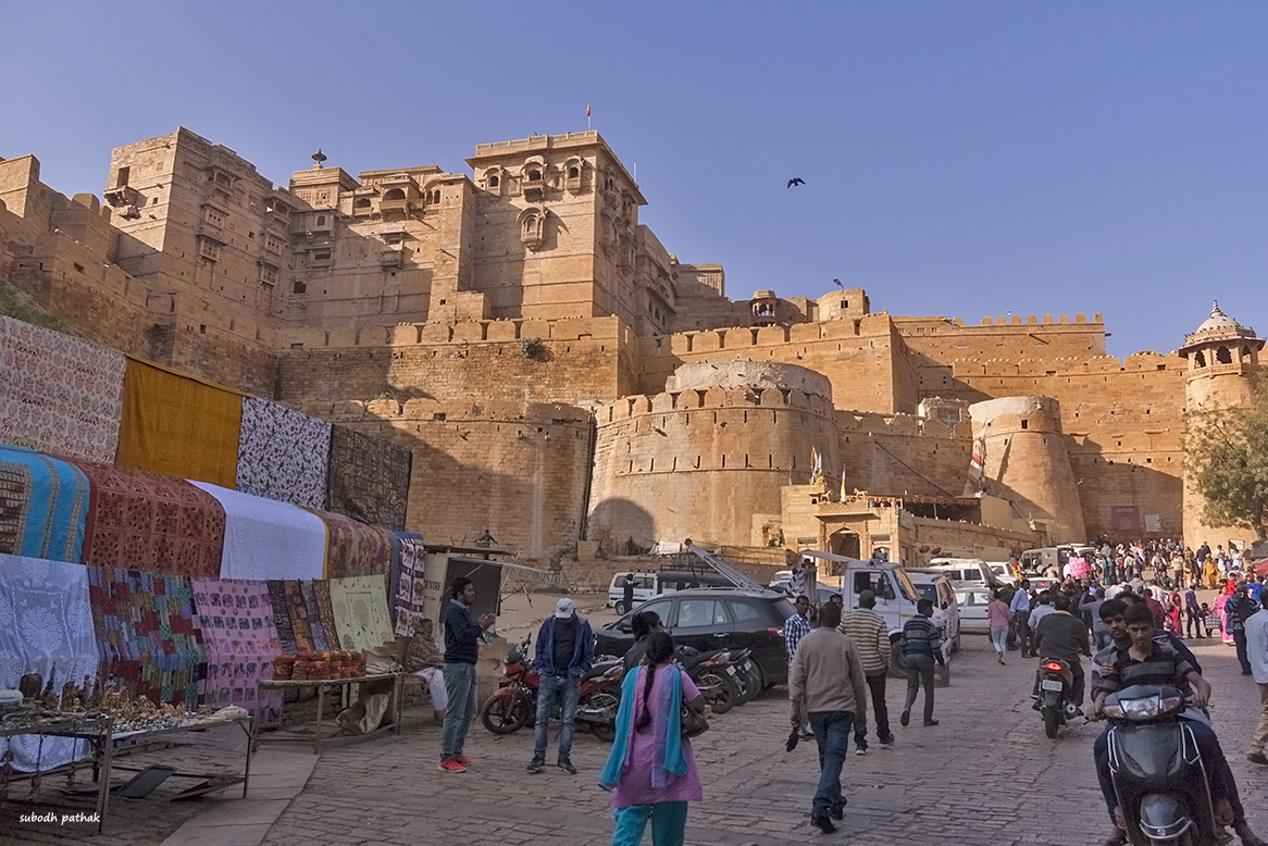 जैसलमेर किल्ला हा भुईकोट किल्ला असून किल्ल्याचा घेर अतिशय मोठा आहे. तिएह राहणारी लोकवस्ती आहे.